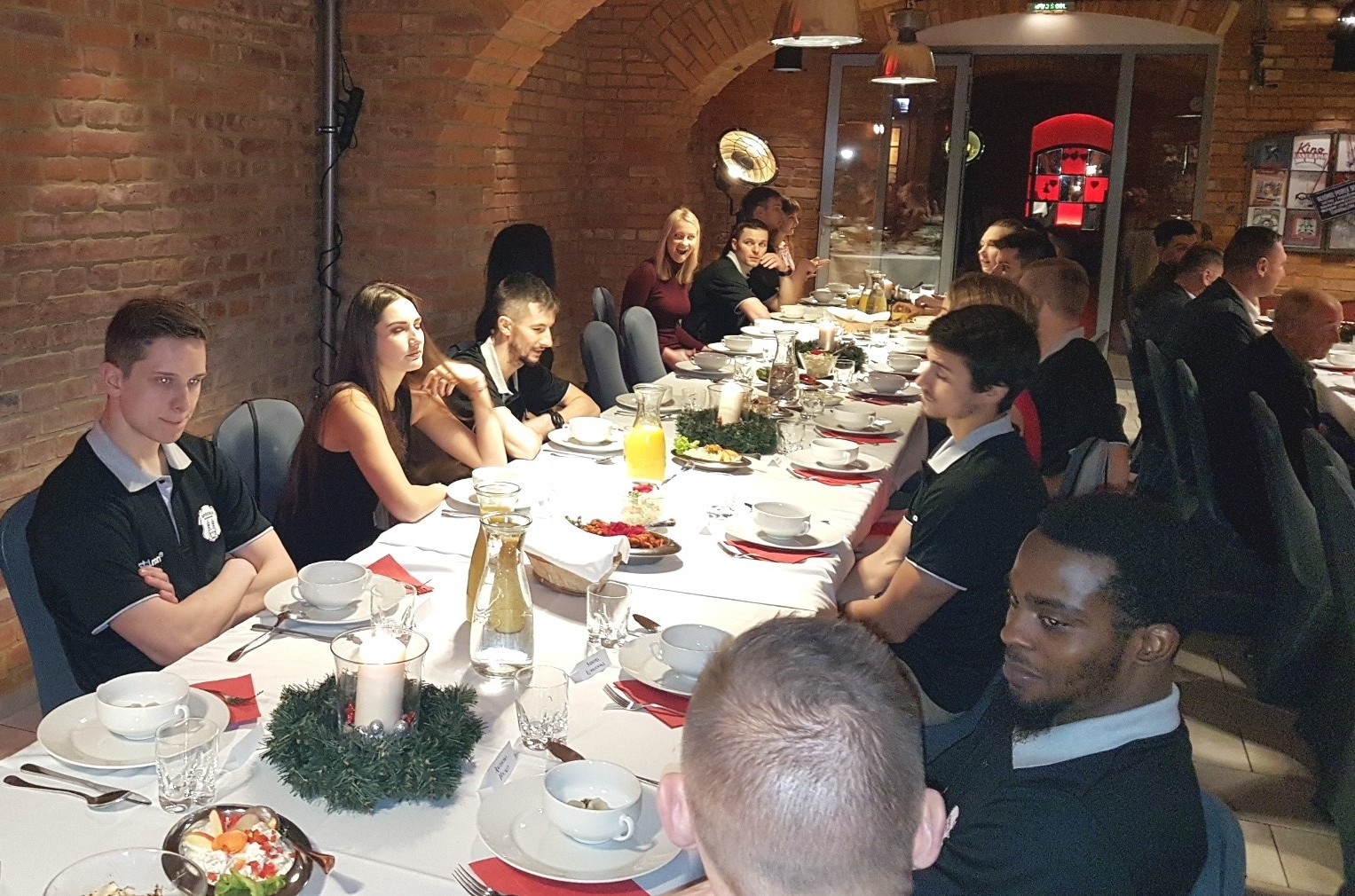 Stargard, 20.12.2018. Wigilia w Spójni.